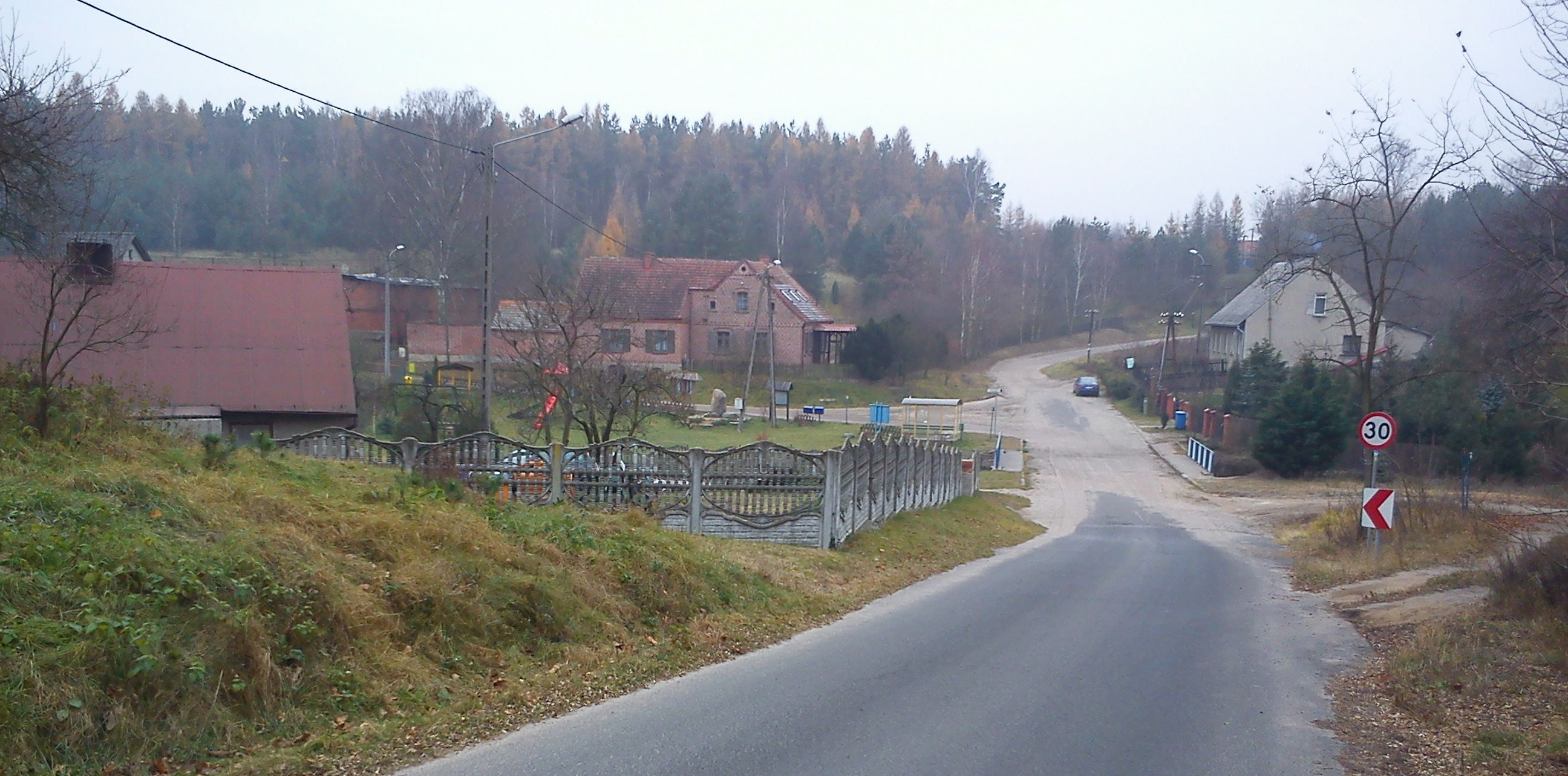 Panorama of Głęboczek (Puszcza Zielonka).